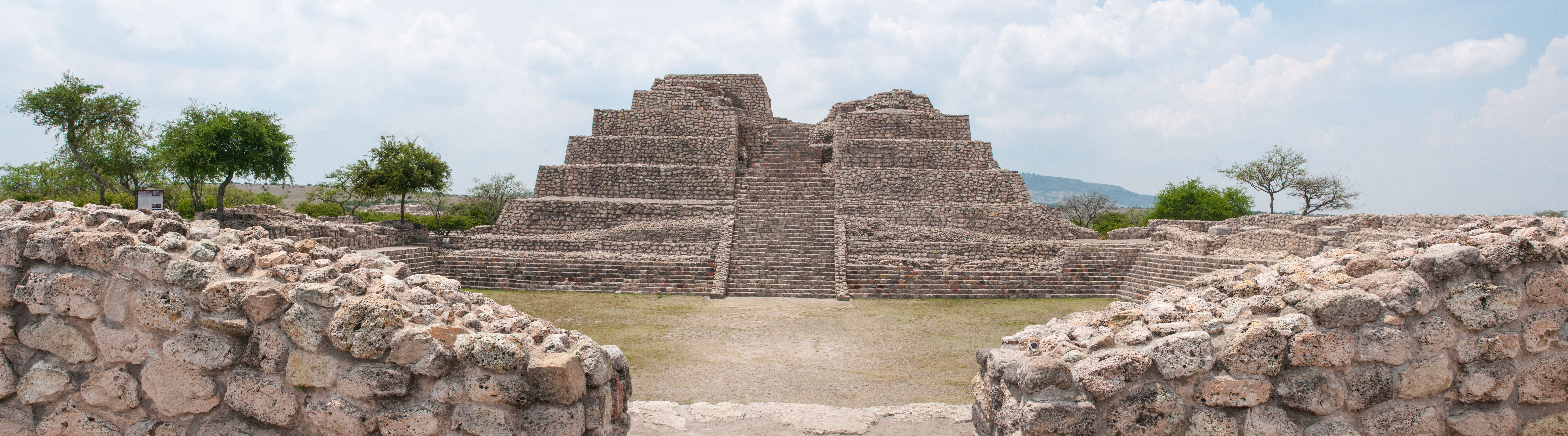 Fotografía panorámica de Cañada de la Virgen es un sitio arqueológico en Guanajuato, muy cercano a San Miguel de Allende.